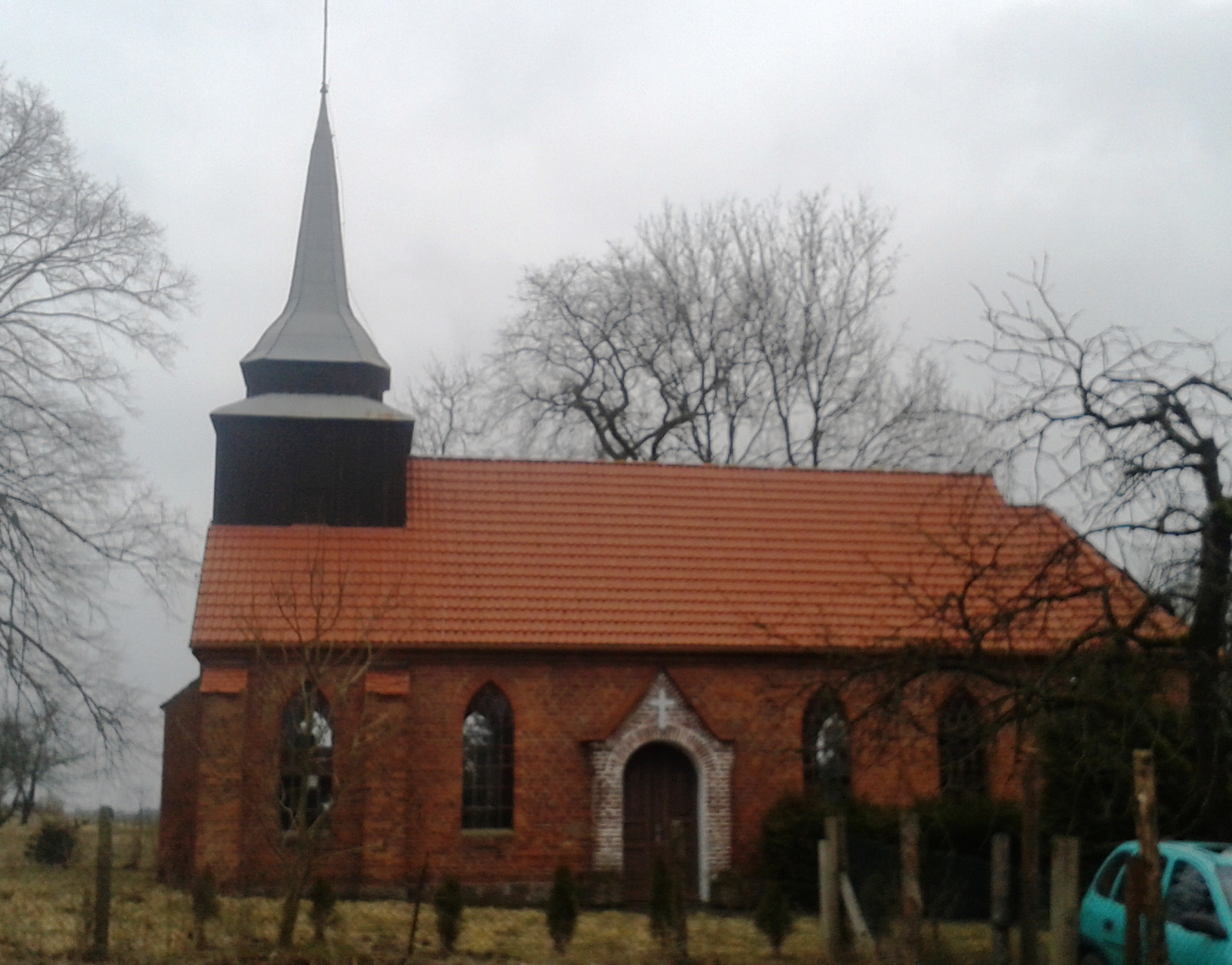 Łabuń Wielki - dawny kościół ewangelicki, obecnie rzymskokatolicki filialny pw. Niepokalanego Serca Maryi, 3 ćw. XIX